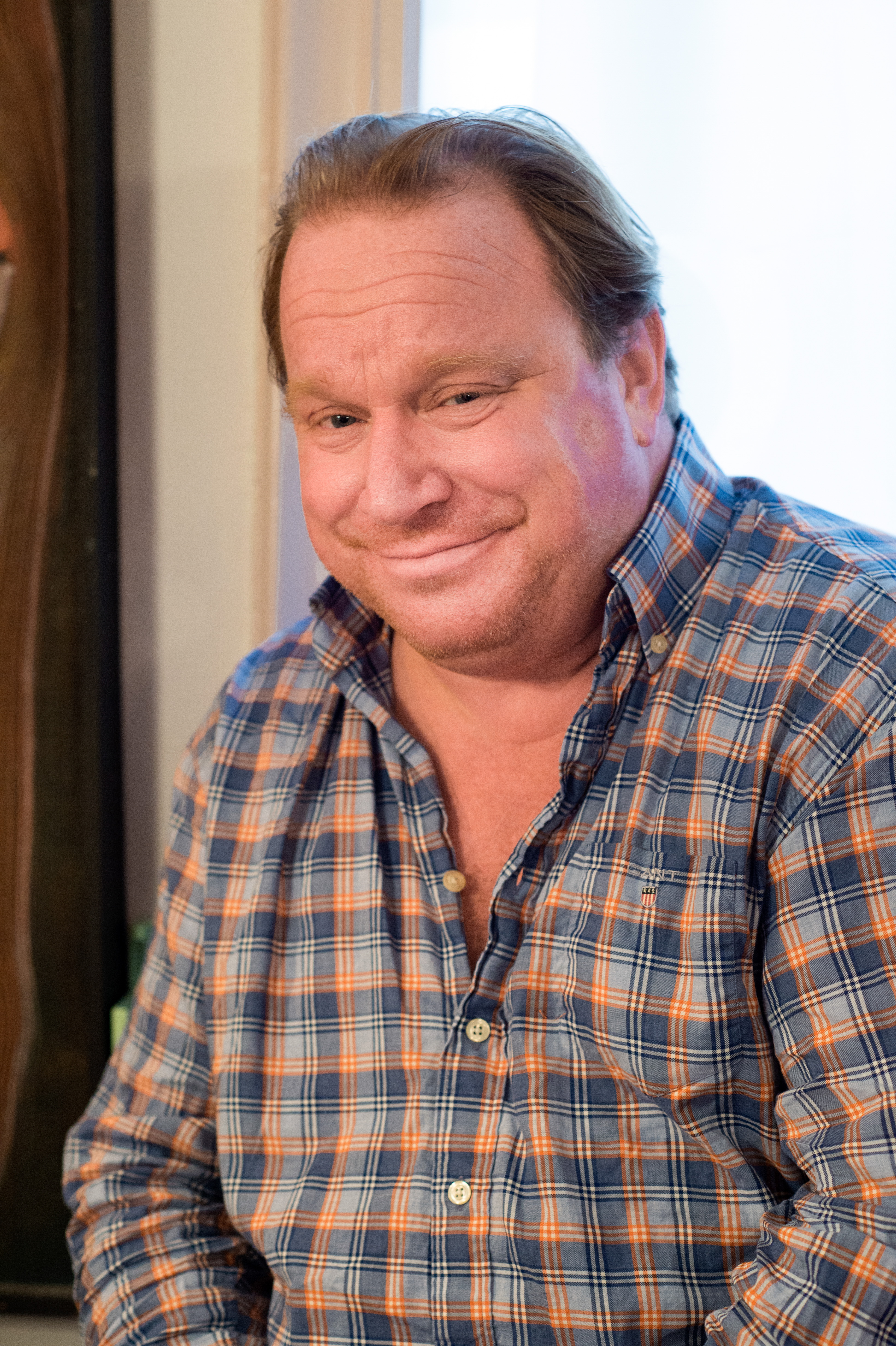 Skådespelaren Claes Malmberg.